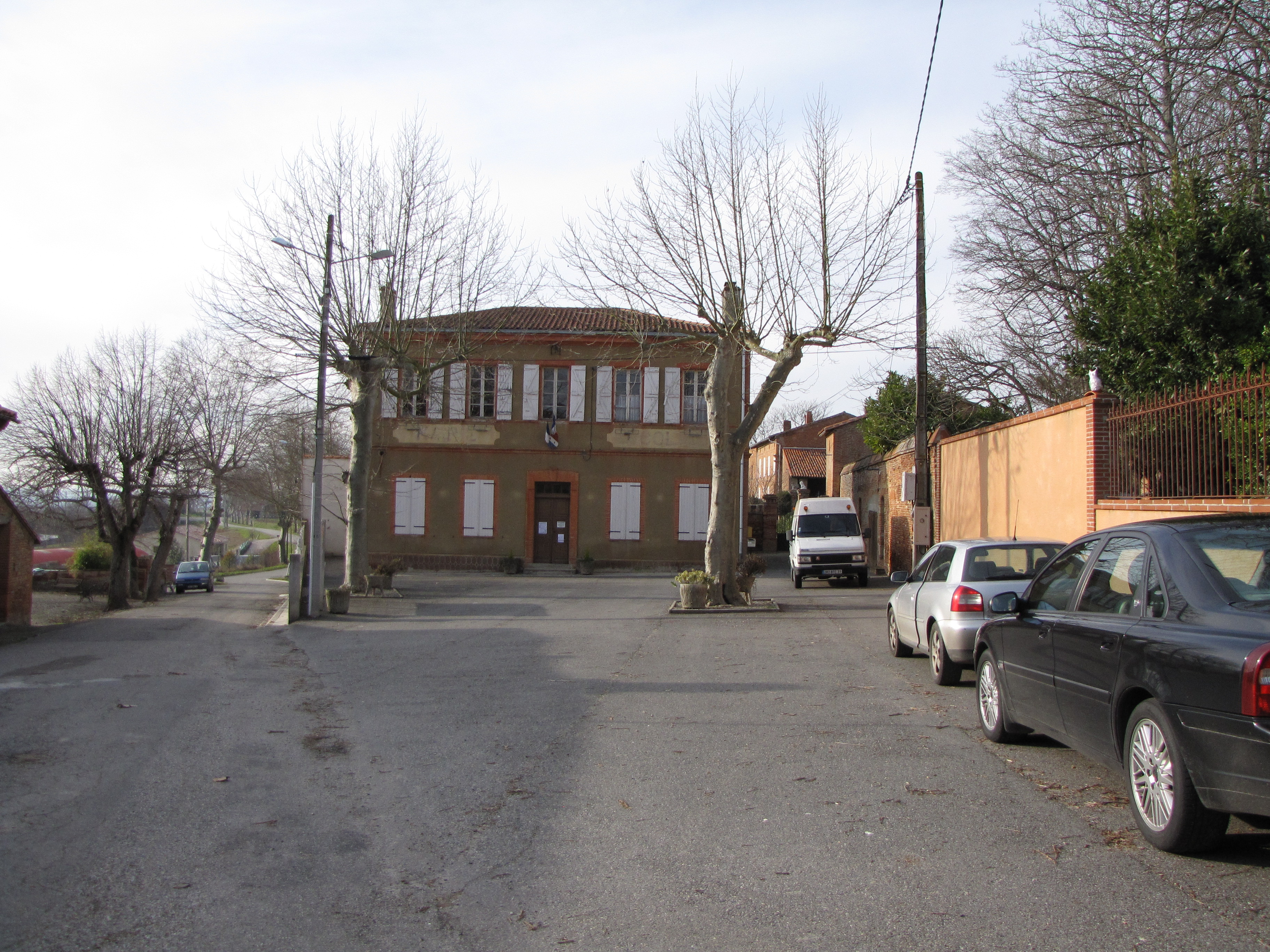 Mairie d'Esperce